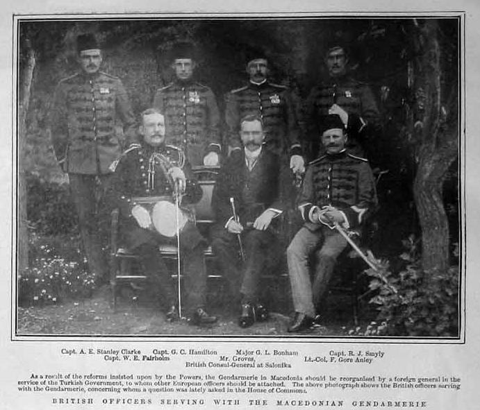 Британски офицери в македонската жандармерия